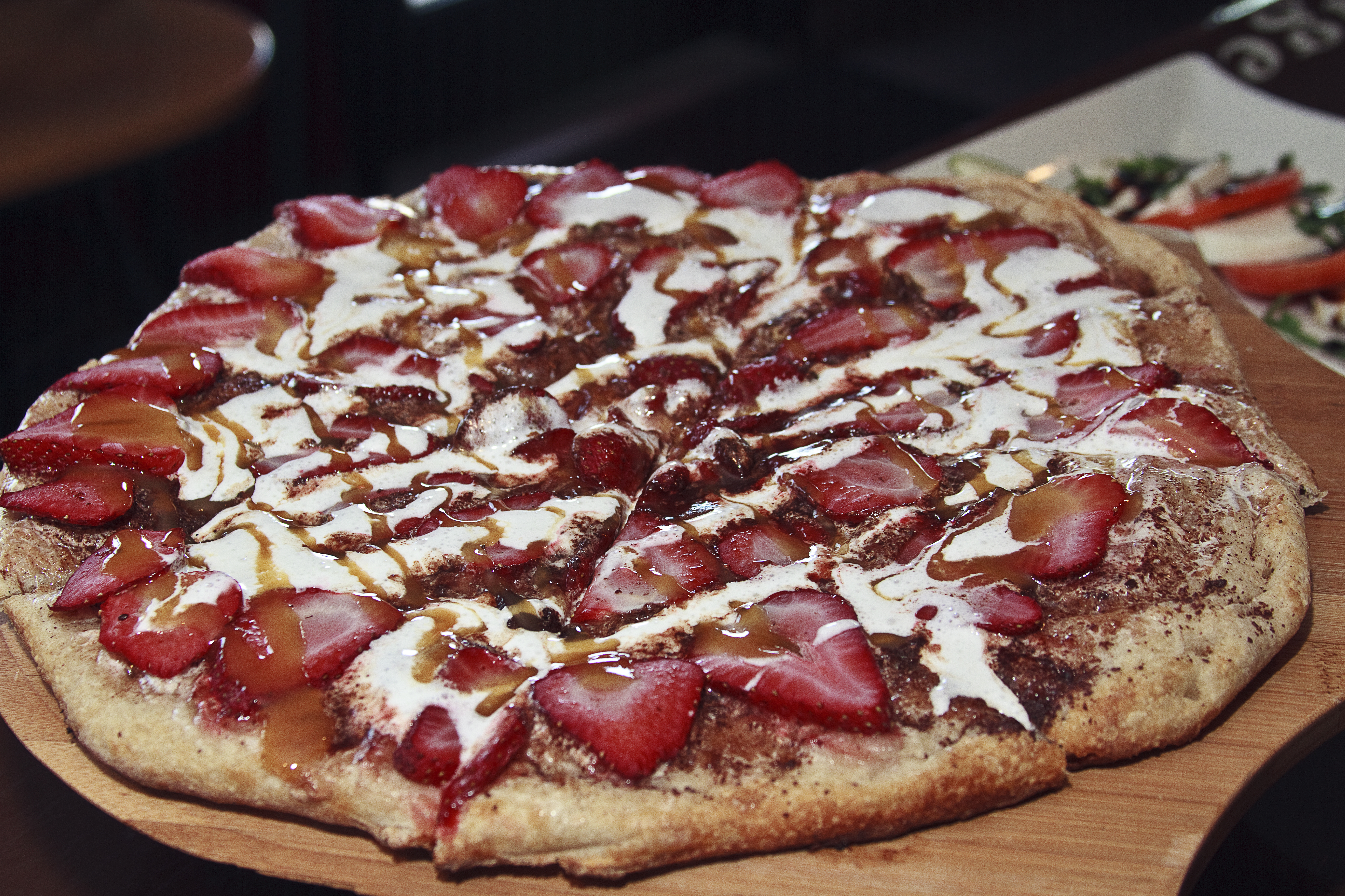 so good.